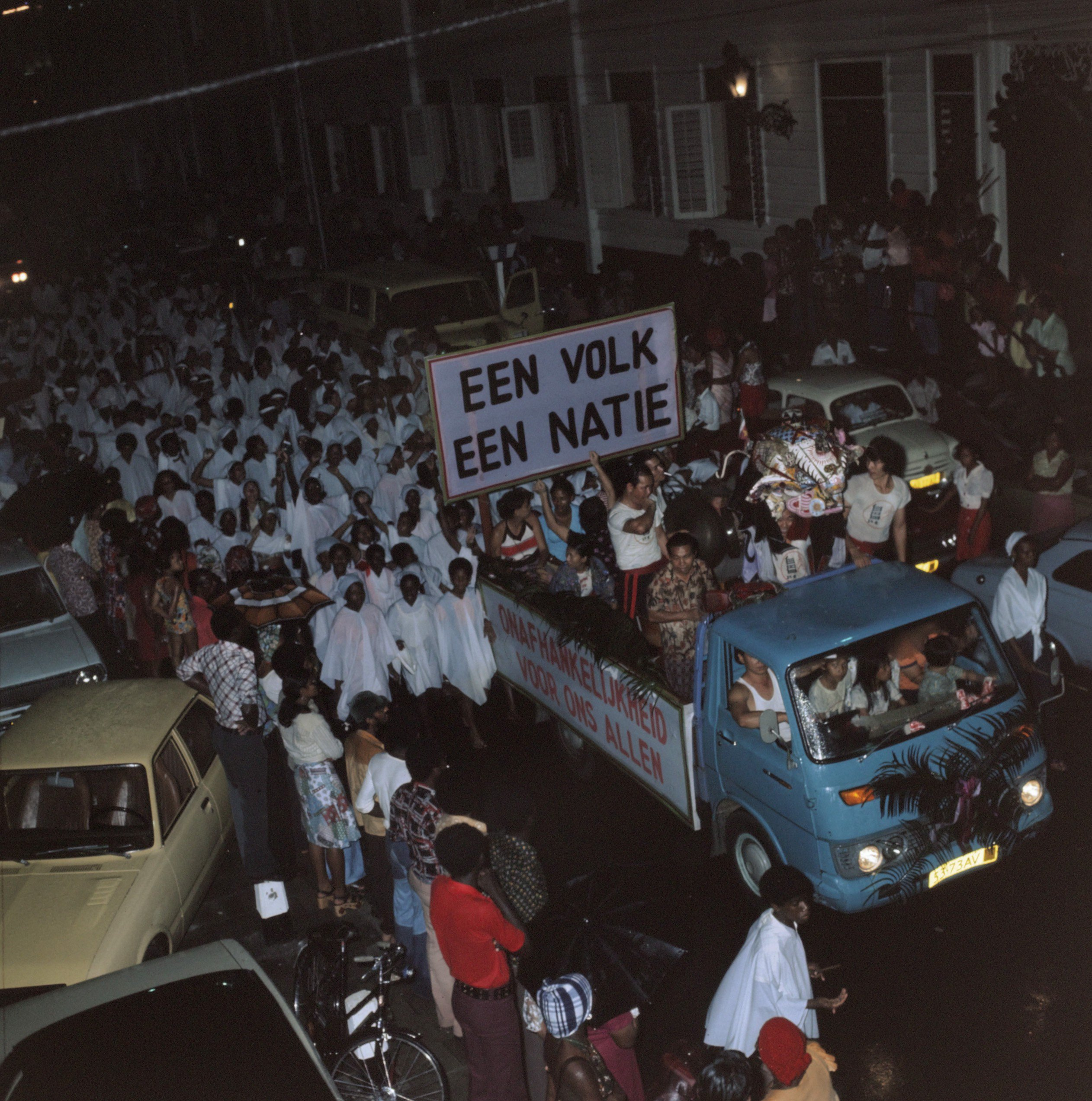 Collectie / Archief : Fotocollectie Anefo Reportage / Serie : [ onbekend ] Beschrijving : Surinaamse onafhankelijkheid; feestende Surinamers op vrachtauto Datum : november 1975 Locatie : Suriname Trefwoorden : vrachtauto's Fotograaf : Verhoeff, Bert / Anefo Auteursrechthebbende : Nationaal Archief Materiaalsoort : Dia (kleur) Nummer archiefinventaris : bekijk toegang 2.24.01.07 Bestanddeelnummer : 254-9800